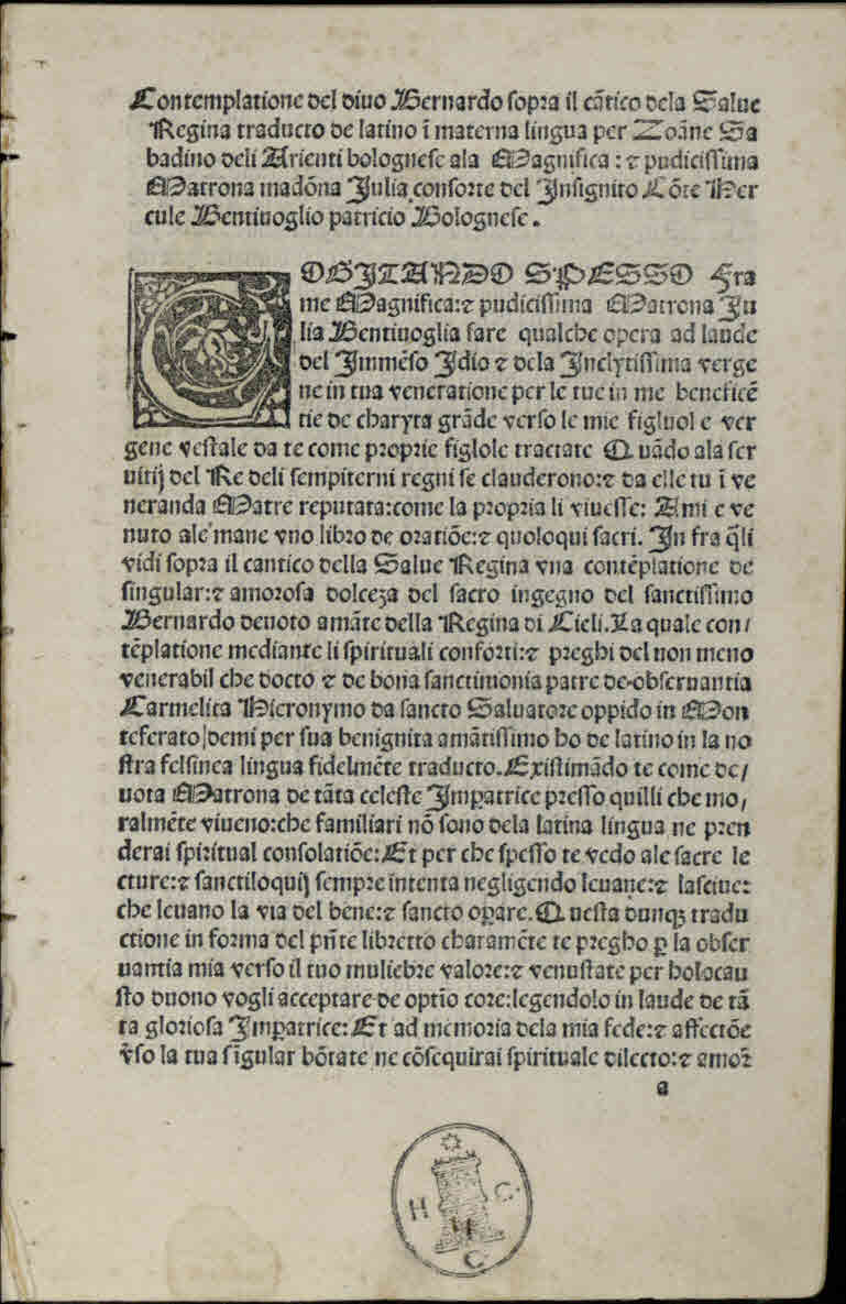 Meditatio super Salve Regina (Trad. Giovanni Sabadino degli Arienti). - Impressum Mutinae : per Dominicum Rocociolum, [circa 1495]. - 8 c. ; a⁸ ; 4°. - Marca tipografica nell'explicit .